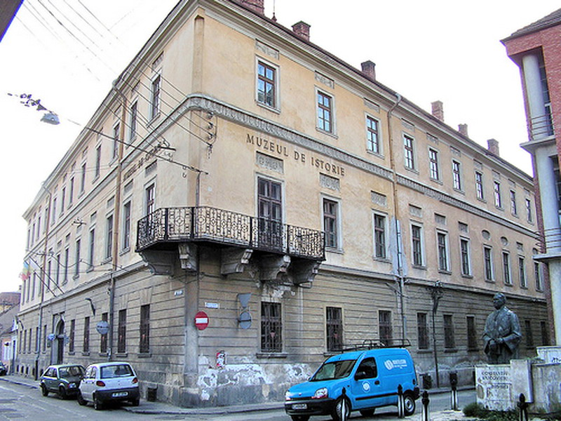 Cluj-Napoca, Muzeul Naţional de Istorie a Transilvaniei, str. C.Daicoviciu nr.2